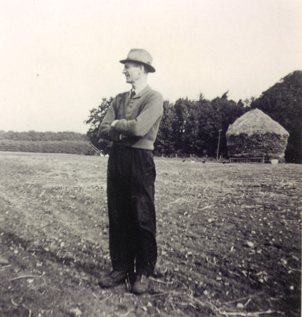 Gösta Hansson auf dem Getreideacker in Nückel bei Bremerhaven